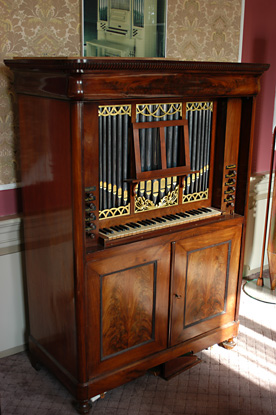 eigenfoto